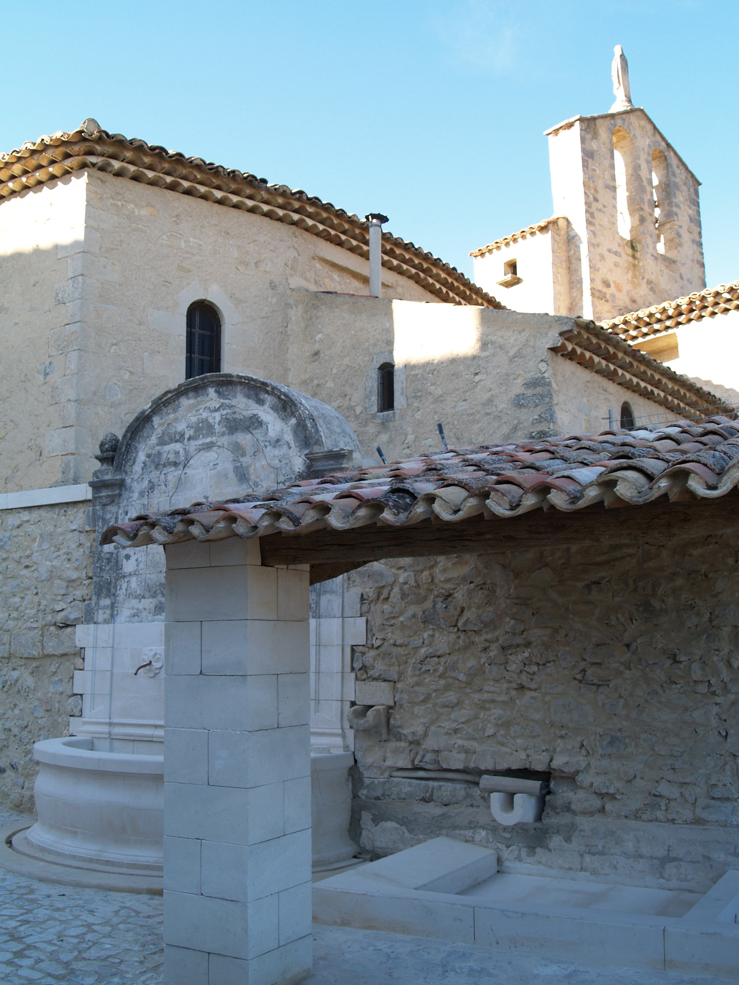 Le lavoir et la fontaine (en restauration) à Vitrolles-en-Luberon (Vaucluse)